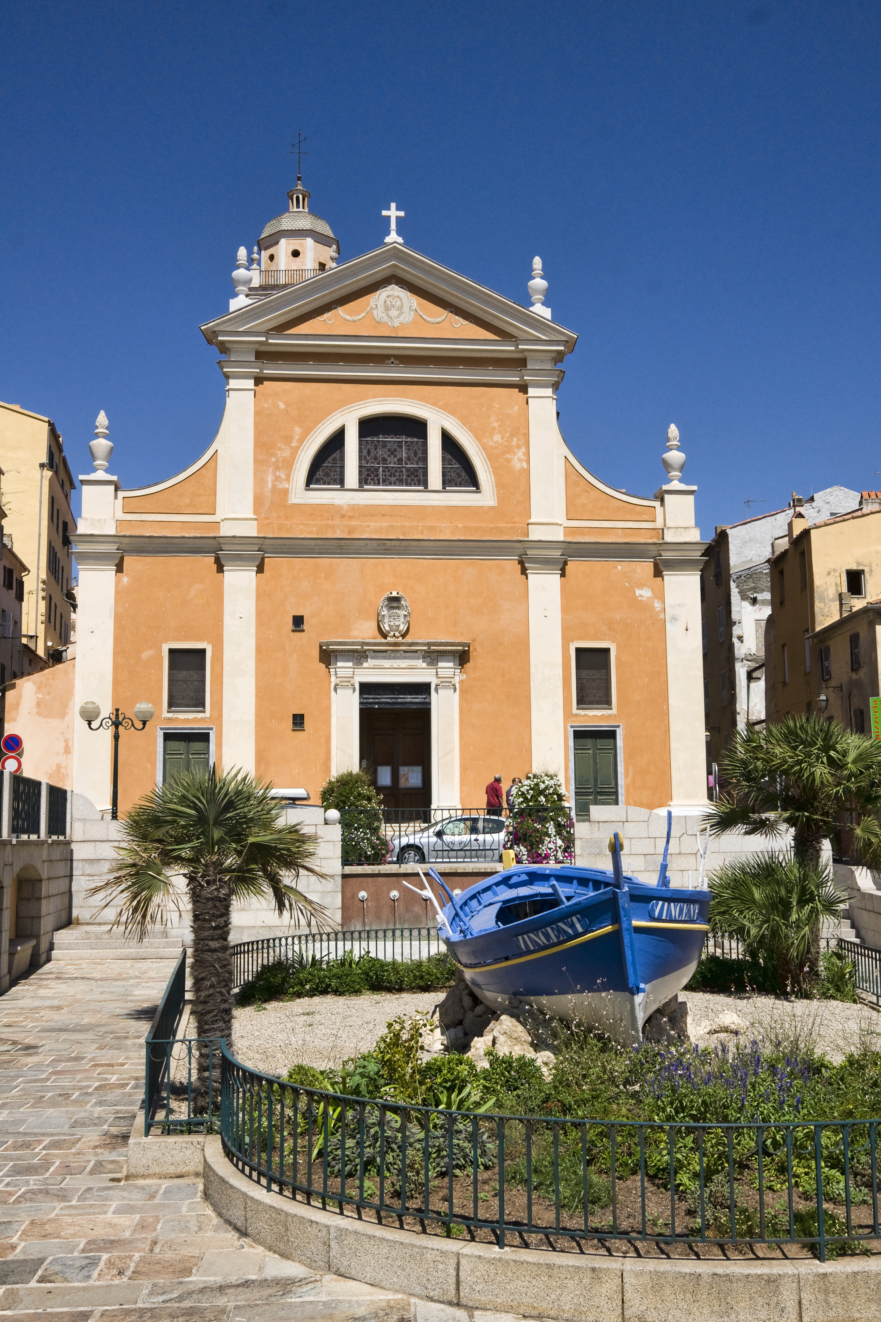 Cathédrale d'Ajaccio